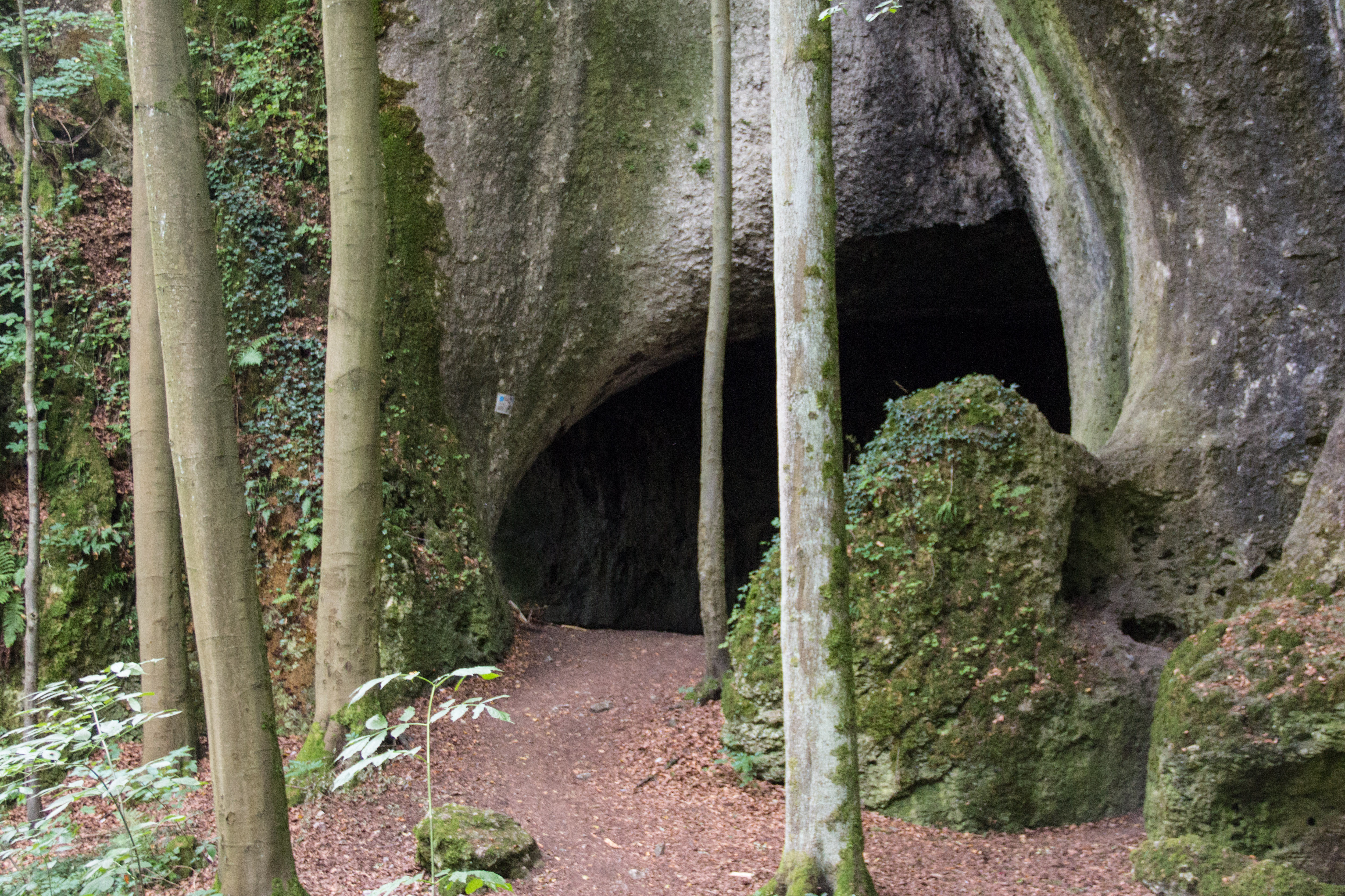 Vogelherdgrotte, A 86, Krottensee, Geotop, Natur- und Bodendenkmal